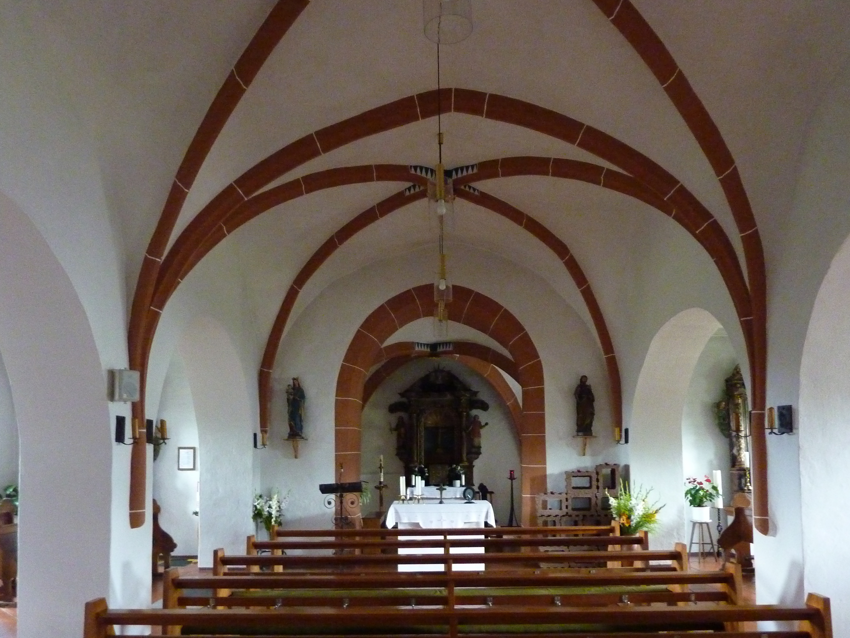 Waldorf, Waldorfstr. 38, kath. Kapelle 9, Mittelschiff n. O